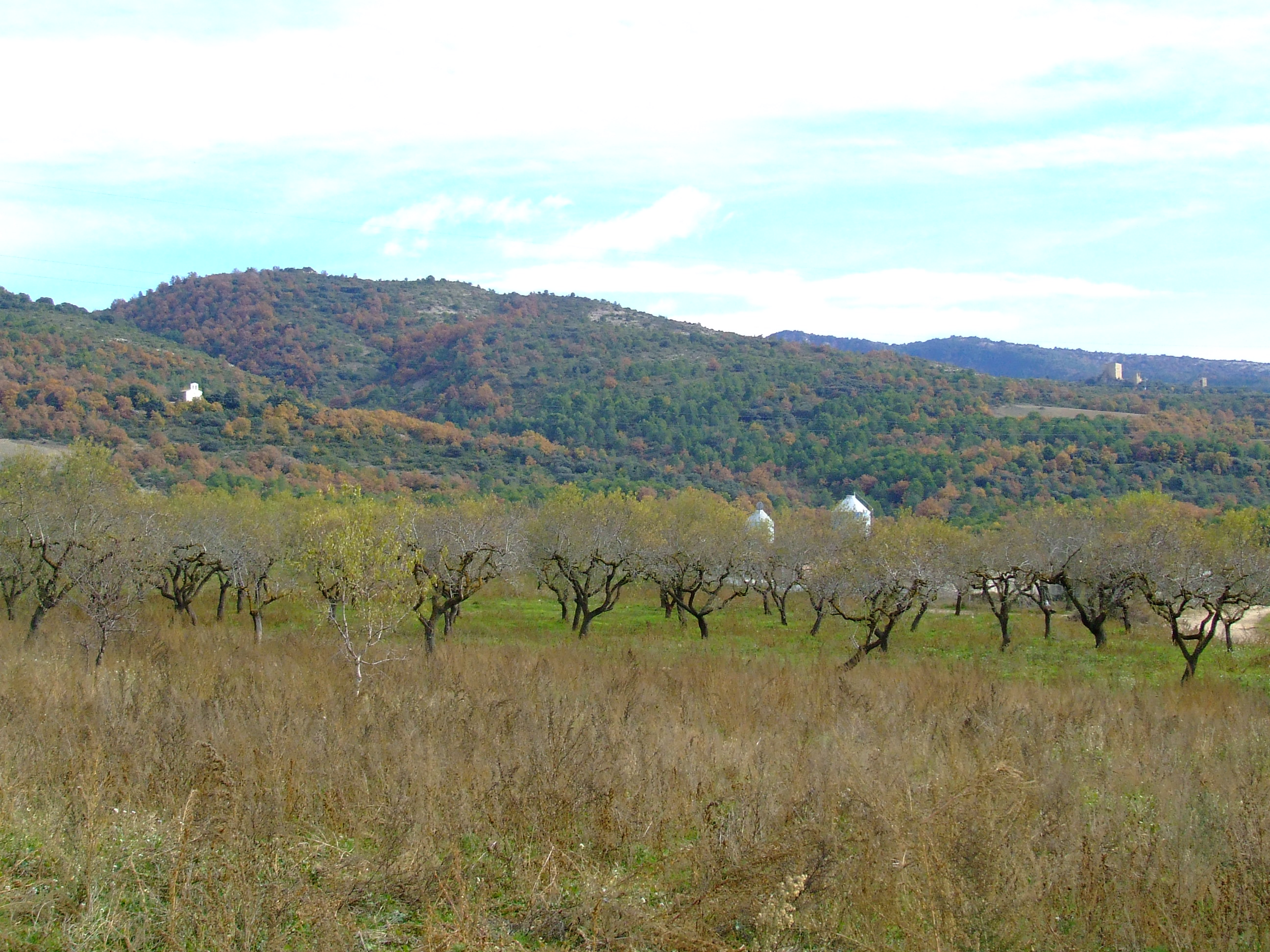 La Mare de Déu de la Posa i els serrats de Goberra (Isona, Isona i Conca Dellà, Pallars Jssà)